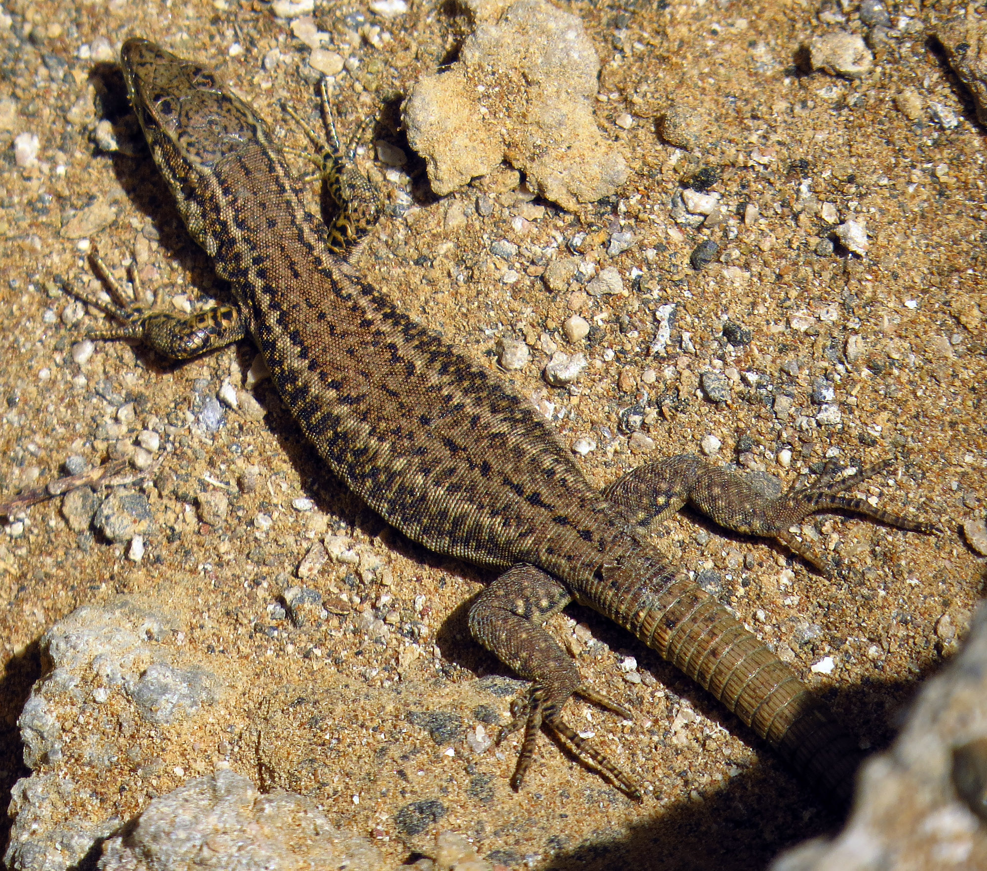 Fotografia d'una Sargantana dels Columbrets (Podarcis atrata)